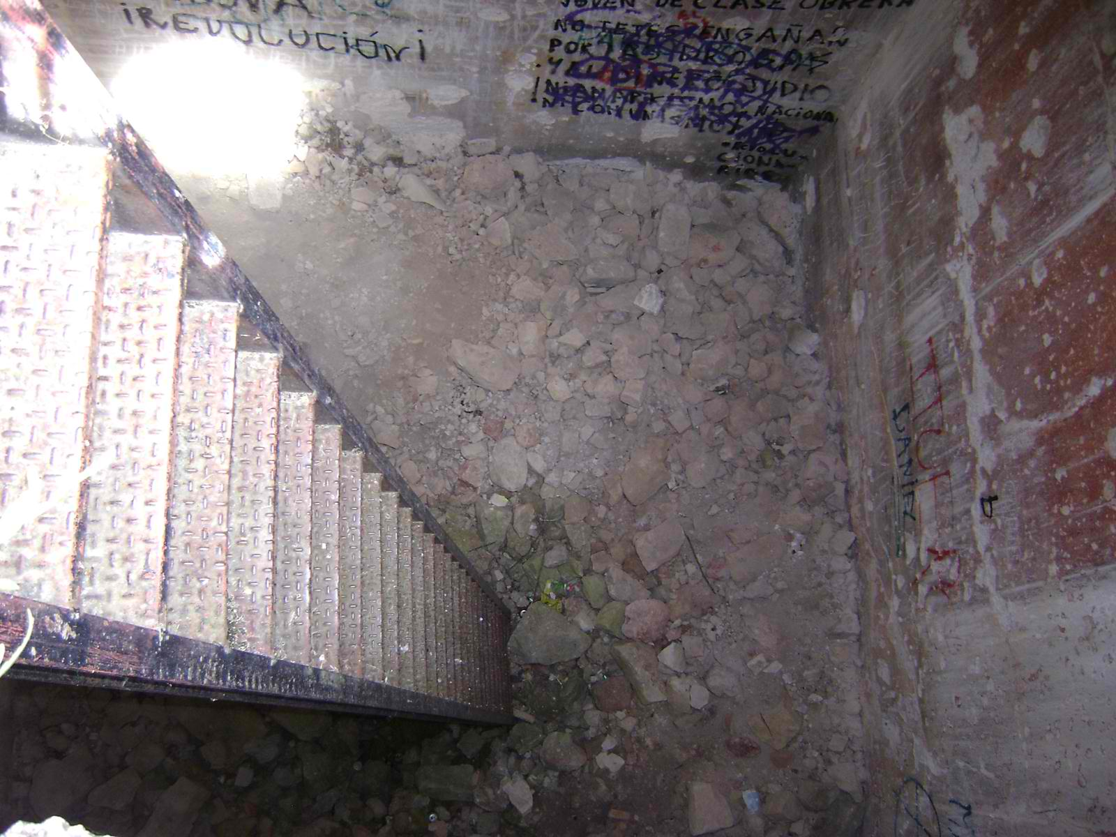 Bajada al aljibe. Impermeabilizante de color rojo